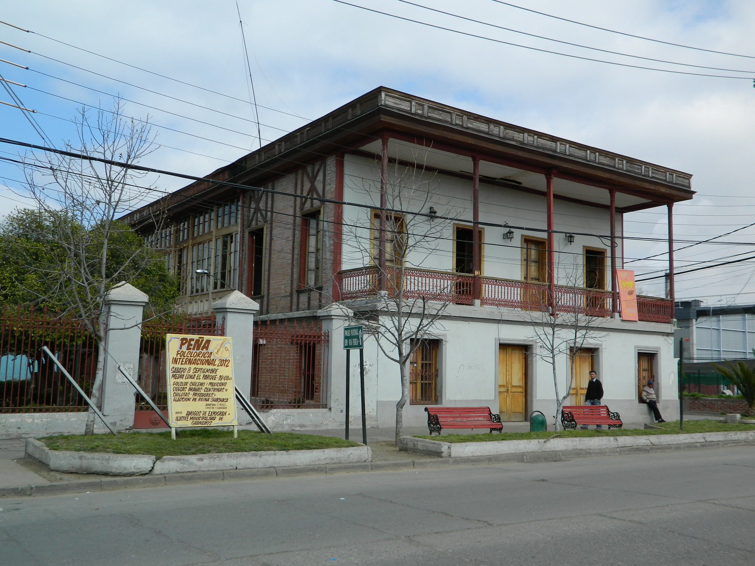 Casa Hodgkinson, llamada así por la primera familia que habitó ahí. En esta casa se construyó el primer automóvil de Chile, de la marca Citröen, al igual que el primer tranvía, carros del ferrocarril y una locomotora. También conocida como Casa San Luis. Actualmente usada como centro cultural y biblioteca de la ciudad de Graneros. This is a photo of a national monument in Chile: 360